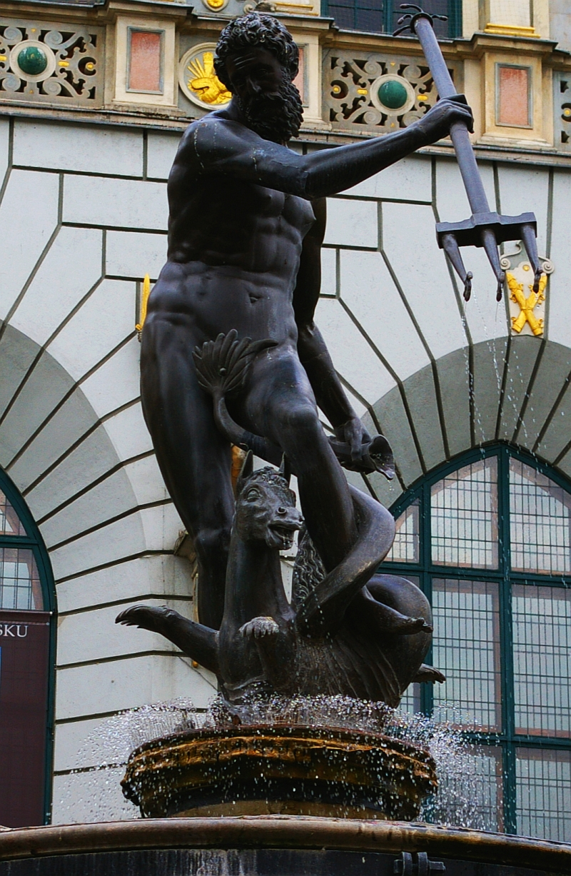 Neptun, fontanna